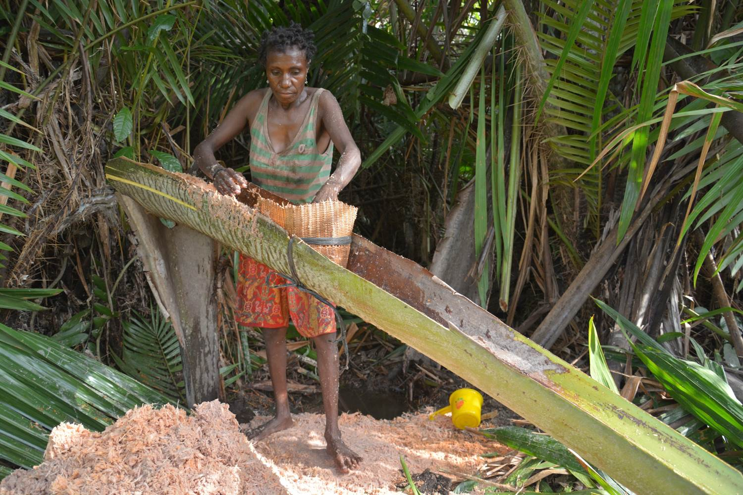 Sago plant that produces the staple food for people in Eastern Indonesia is disappearing due to deforestation. Seorang ibu di Papua mengekstrak pati dari dalam batang pohon sagu. Sagu merupakan makanan utama masyarakat di kawasan timur Indonesia. Pohon sagu semakin menghilang karena deforestasi.